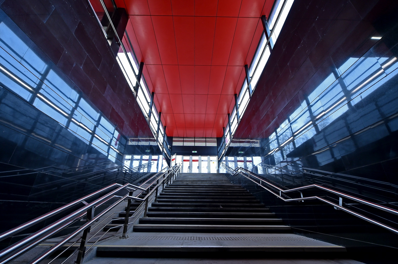 Станция Минская Московского метрополитена. Лестница наружного вестибюля